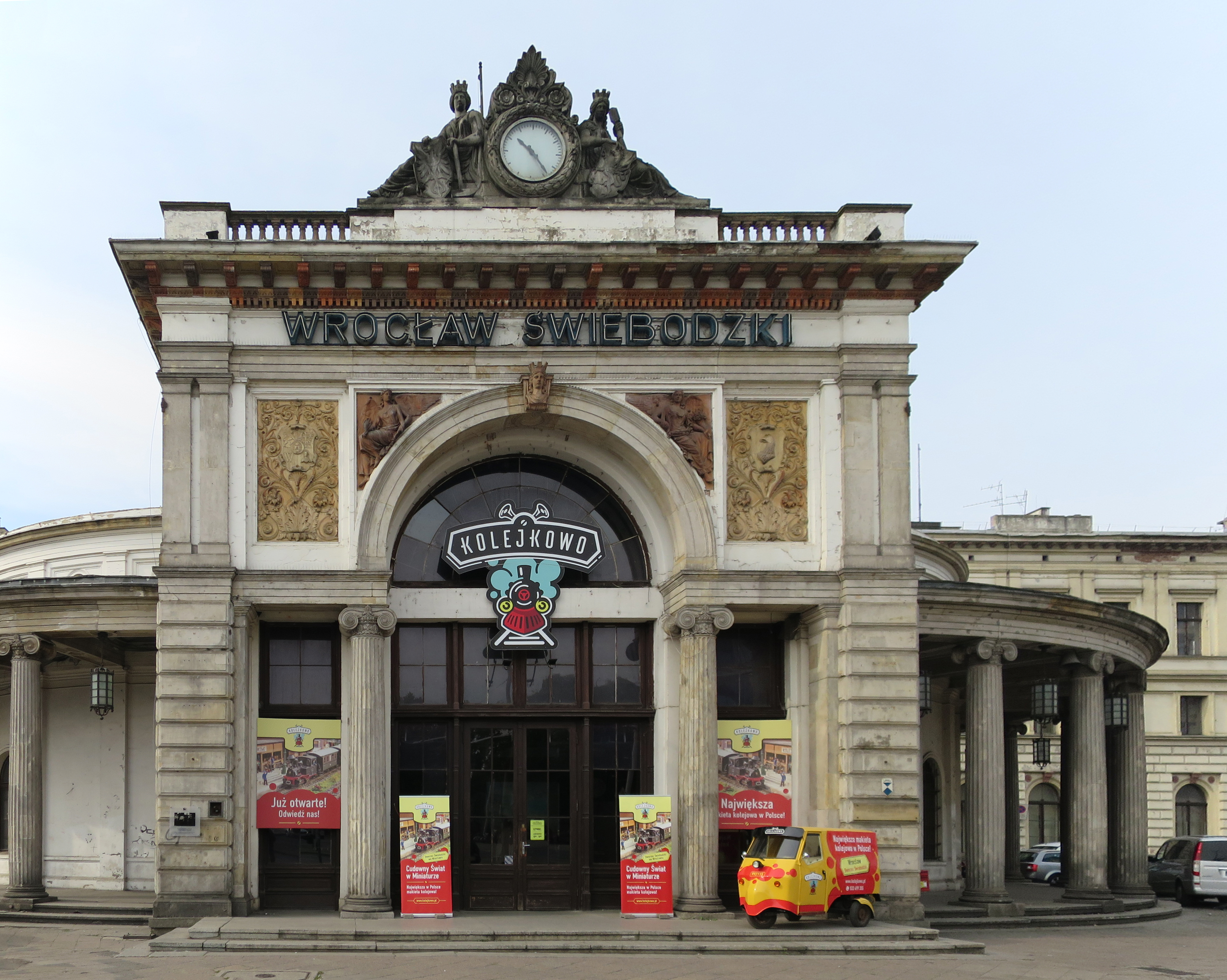 Kolejkowo - makieta kolejowa na Dworcu Świebodzkim we Wrocławiu This photo was taken during Railway Wikiexpedition 2015 set up by Wikimedia Polska Association in cooperation with Fundacja Grupy PKP.You can see all photographs in category Wikiekspedycja kolejowa 2015.